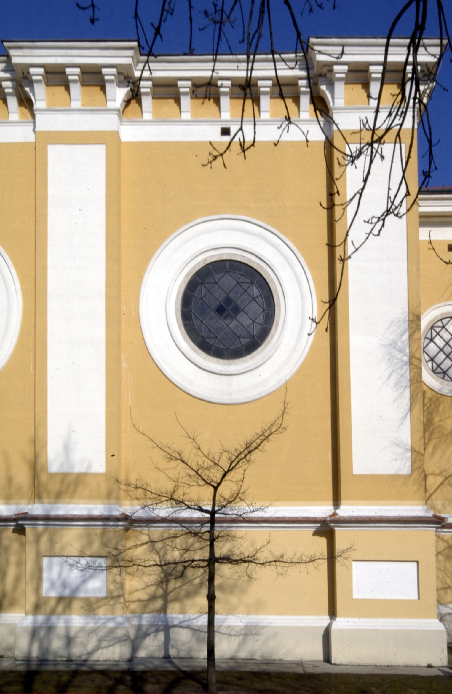 katholische Pfarrkirche heiliger Ulrich / Fassadensegment an der Südfassade